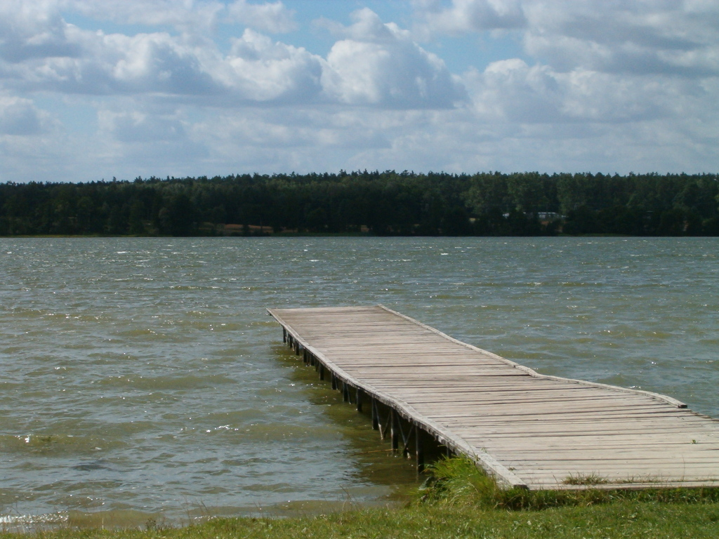 Rybno - pomost na jeziorze Zarybinek, 2003